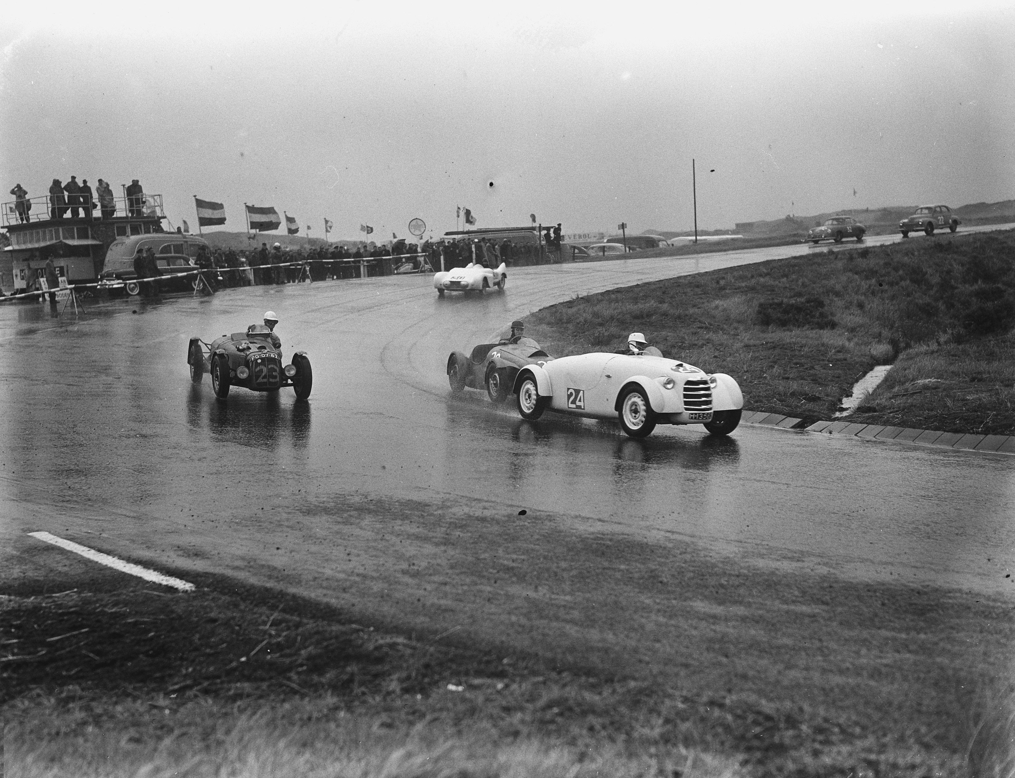 Collectie / Archief : Fotocollectie Anefo Reportage / Serie : [ onbekend ] Beschrijving : Zandvoort auto en motorraces , sportwagen in Hunzebocht Datum : 25 juli 1954 Locatie : Noord-Holland, Zandvoort Trefwoorden : sportwagens Fotograaf : Rossem, Wim van / Anefo Auteursrechthebbende : Nationaal Archief Materiaalsoort : Glasnegatief Nummer archiefinventaris : bekijk toegang 2.24.01.09 Bestanddeelnummer : 906-6224